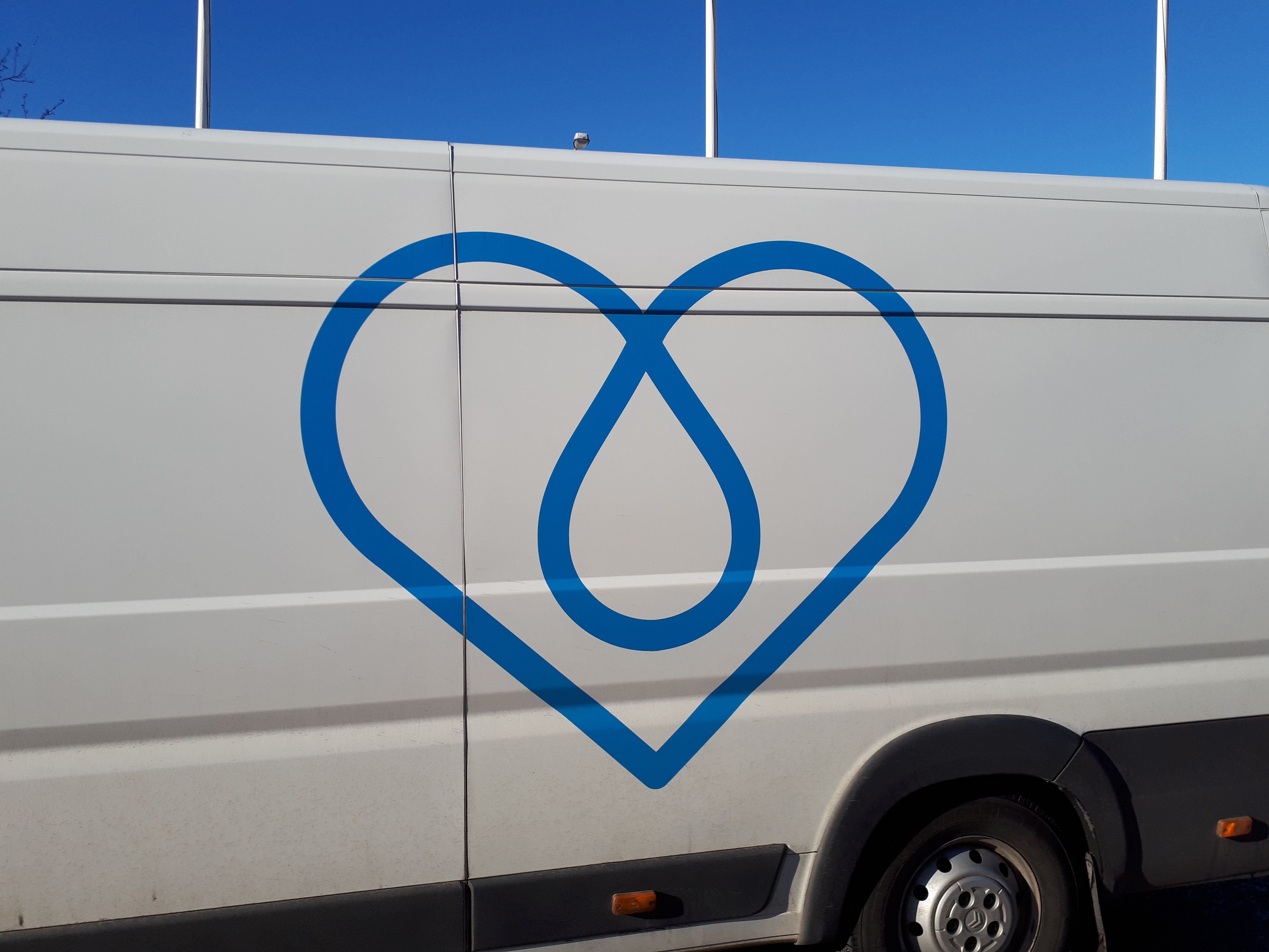 Turun Vesihuollon auto